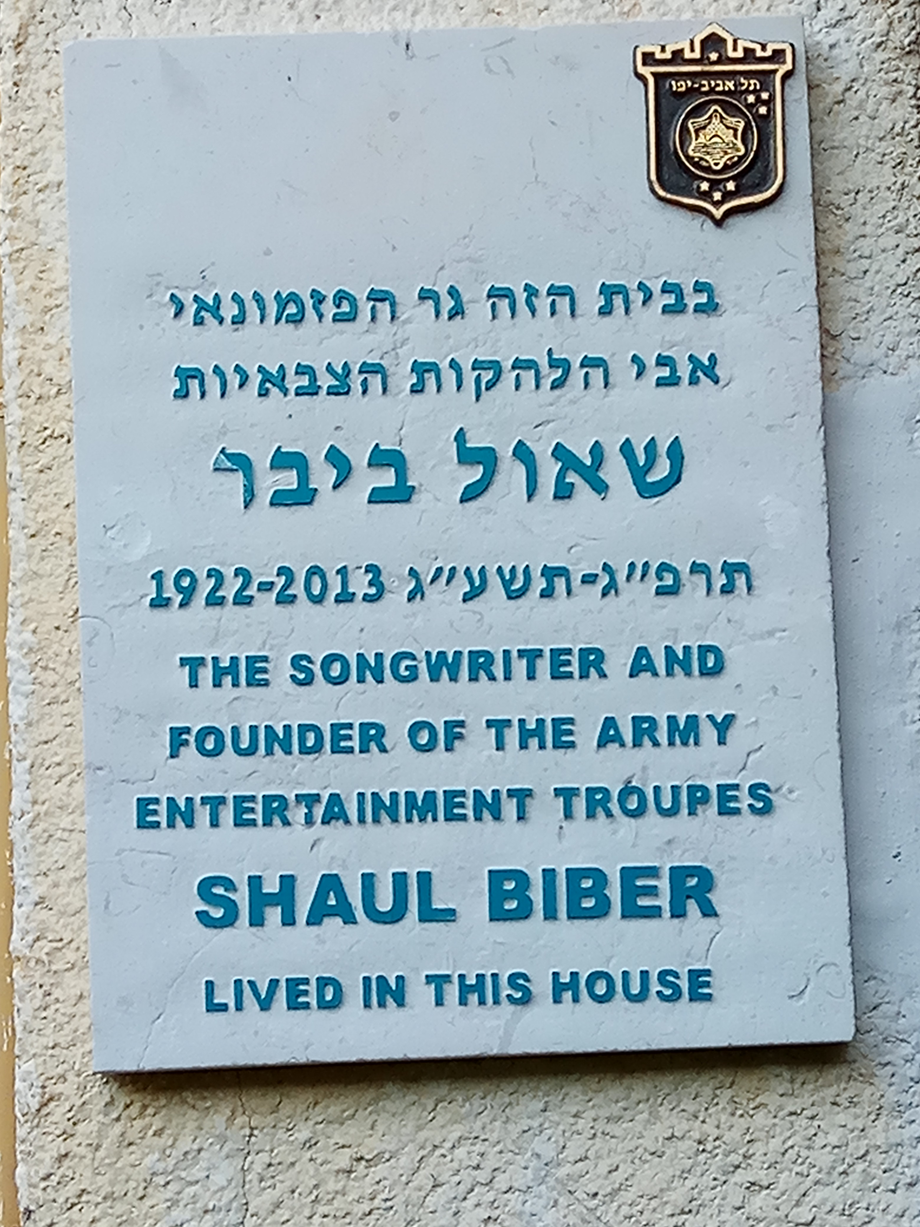 לוחית זיכרון לשאול ביבר ברח' צבי הרמן שפירא 17 בתל אביב